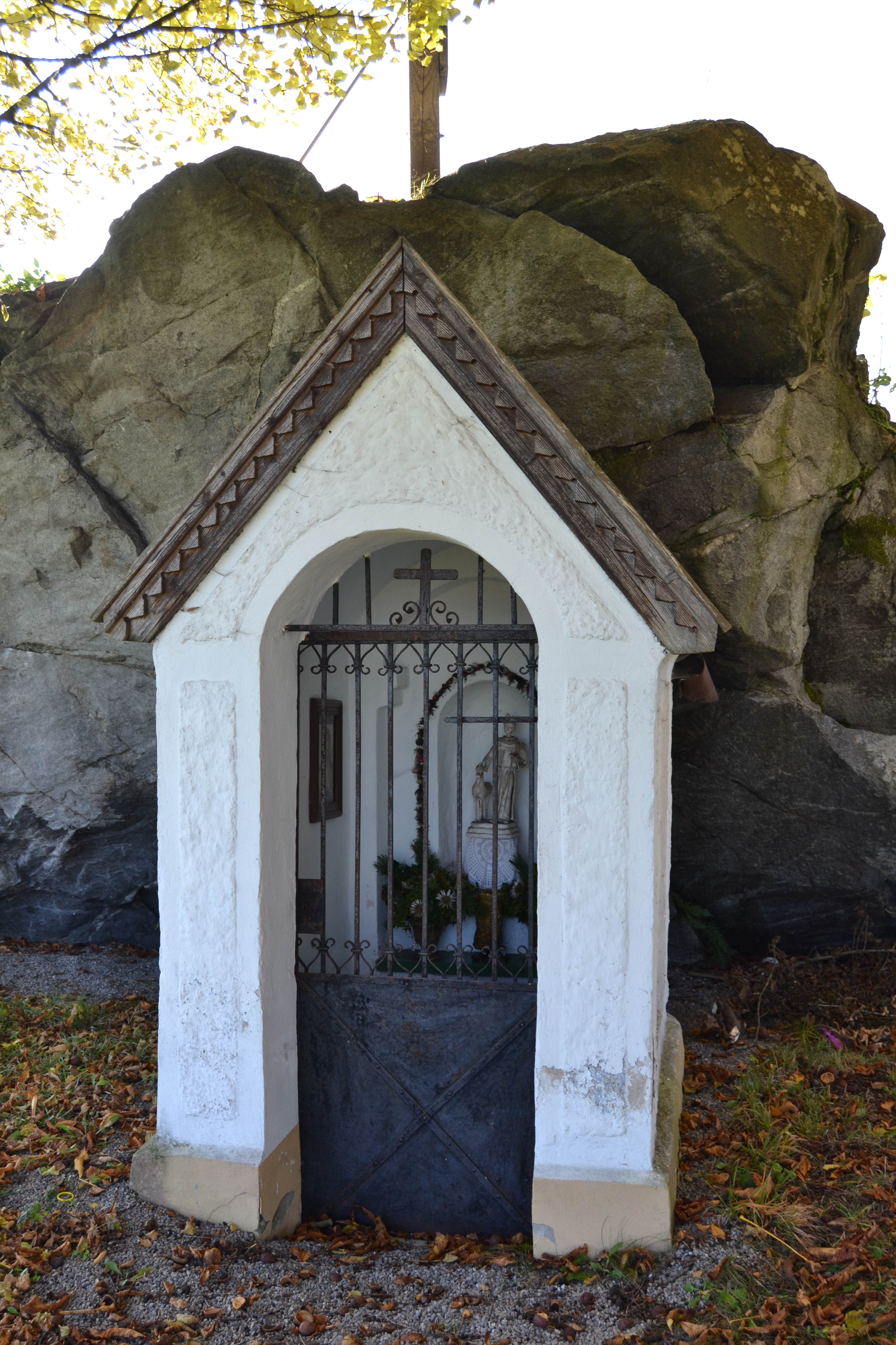 Kapelle vor dem Großen Stein